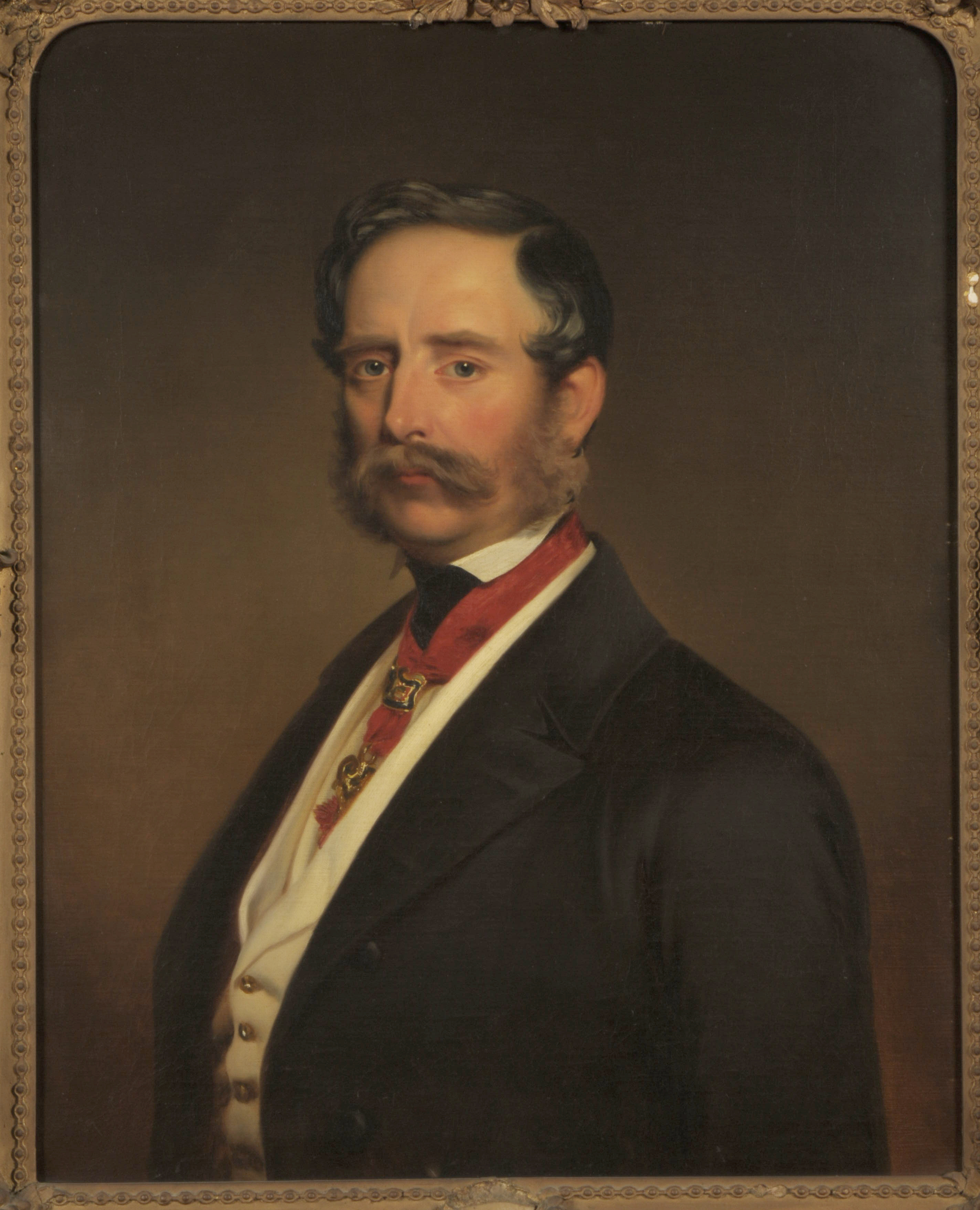 Hugo Karel Eduard Salm-Reifferscheidt-Raitz (1803 - 1888), Moravský politik, velkostatkář a průmyslník.